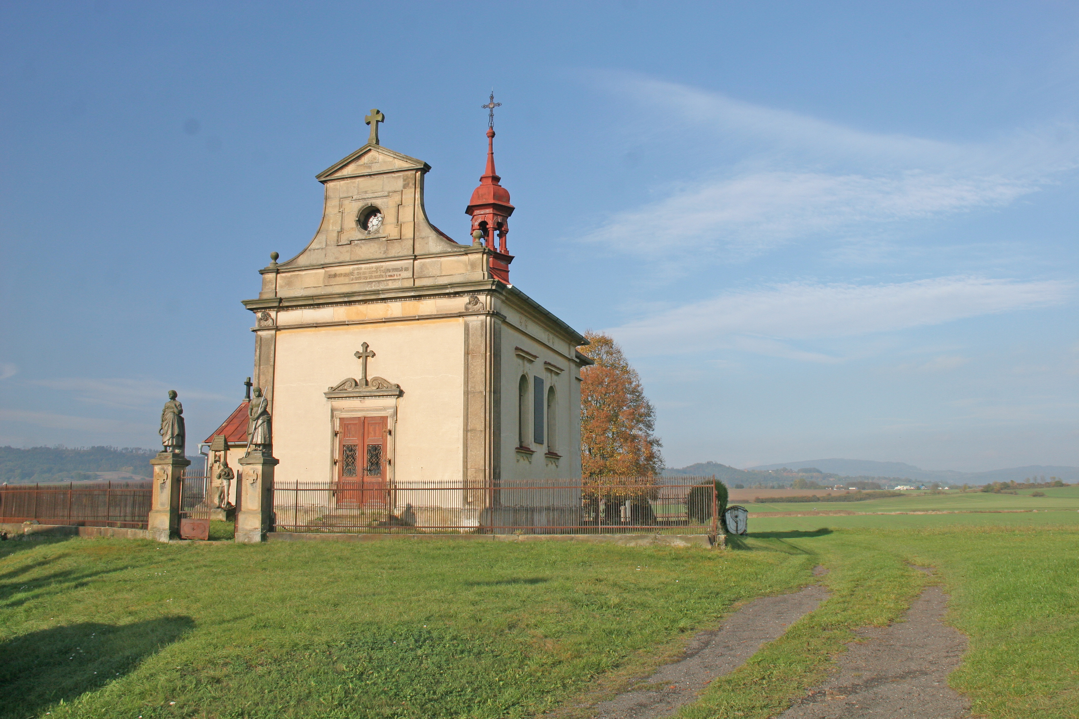 Březina kostel